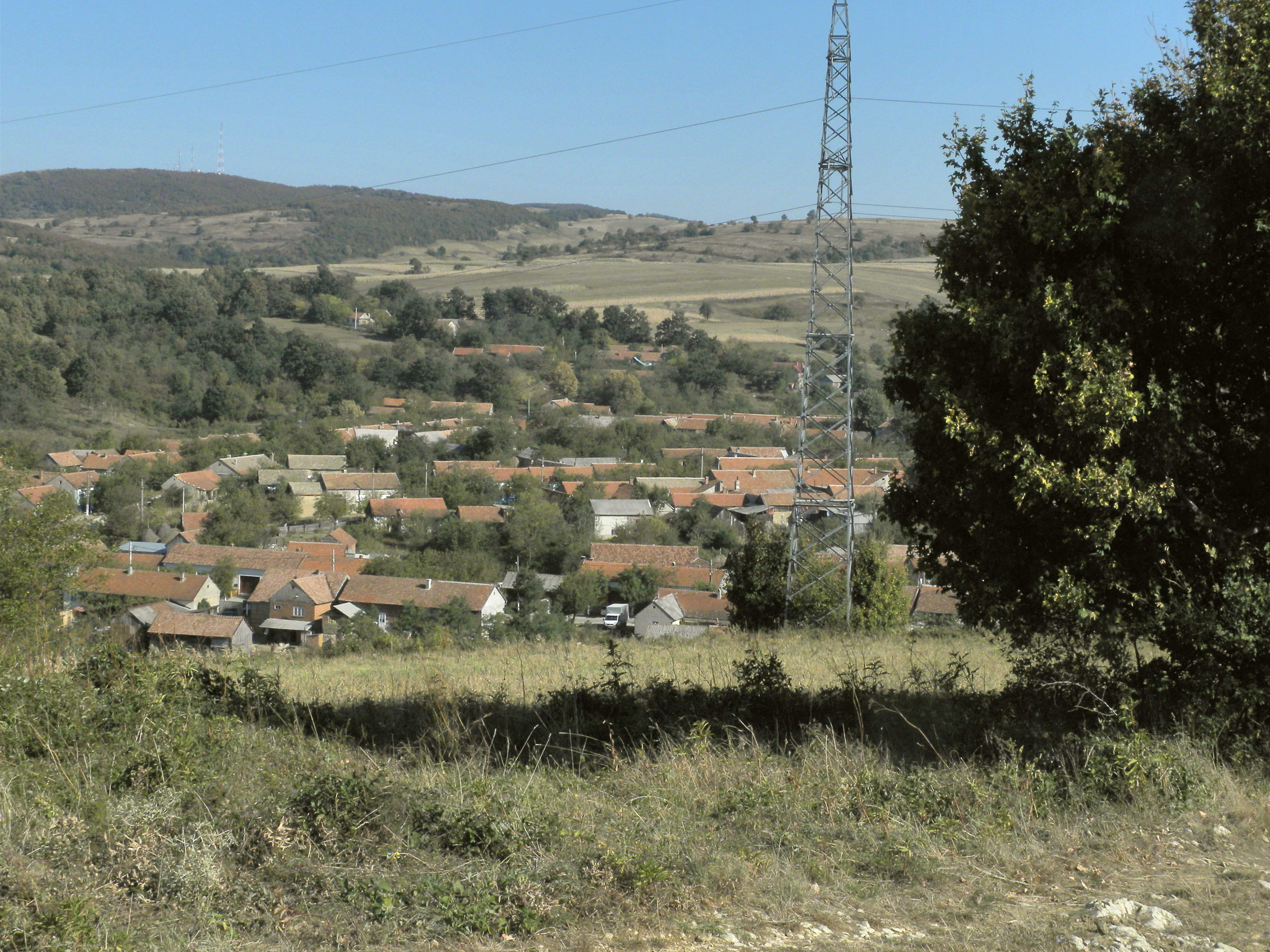 Banat, St.Helena